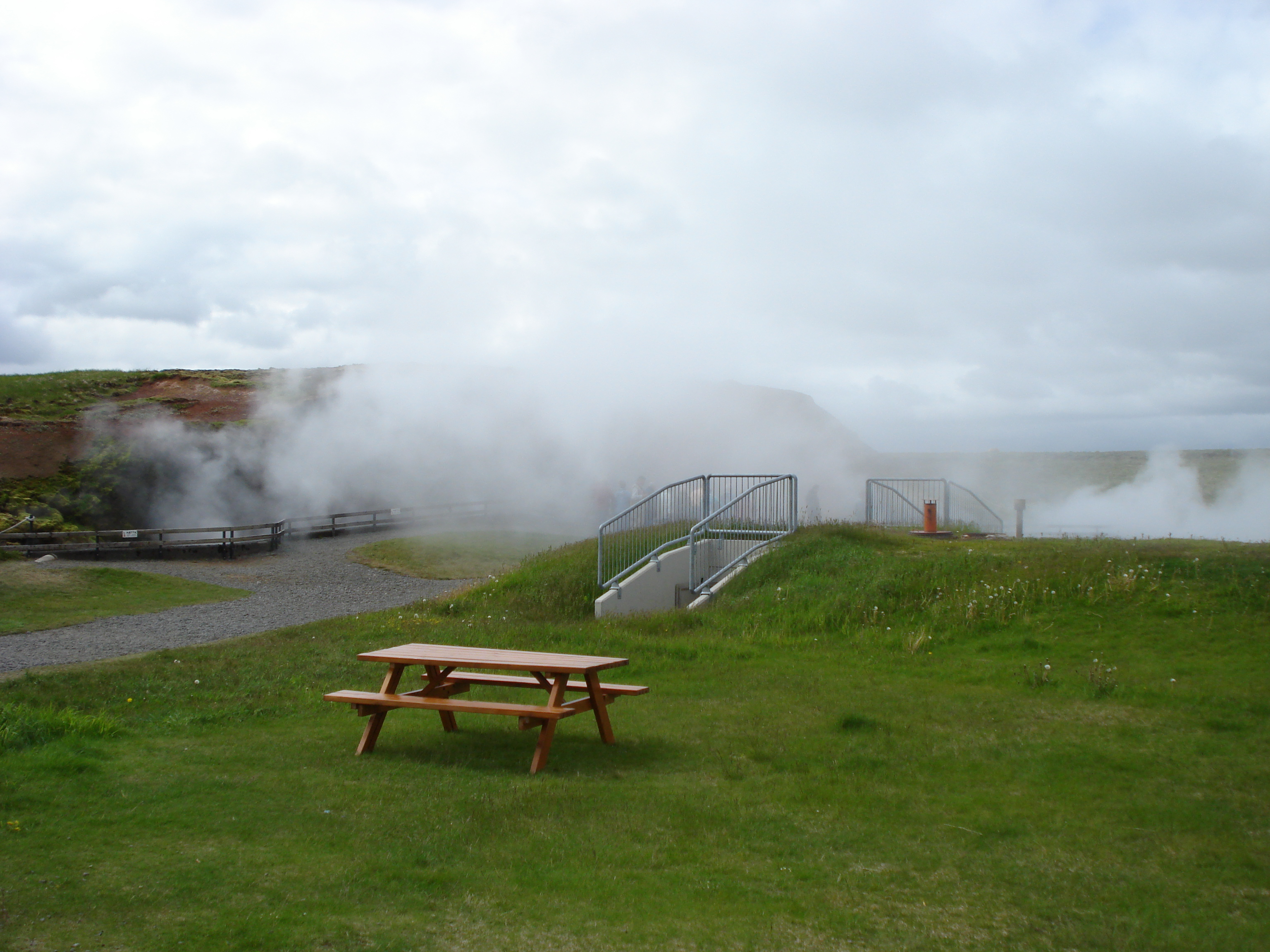 Deildartunga, hotspring in Iceland